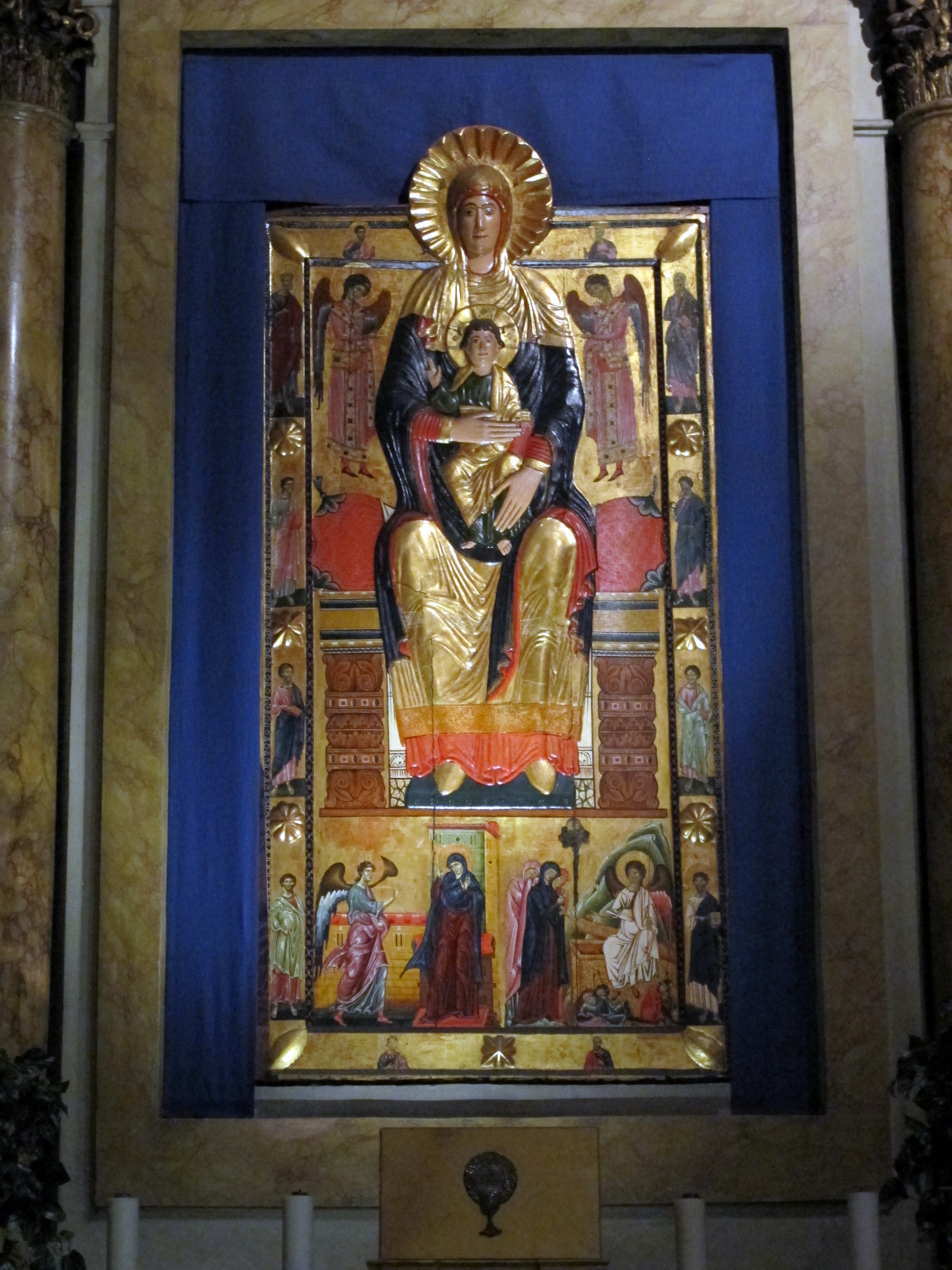 Cappella carnesecchi di barnardo, madonna reliquiario